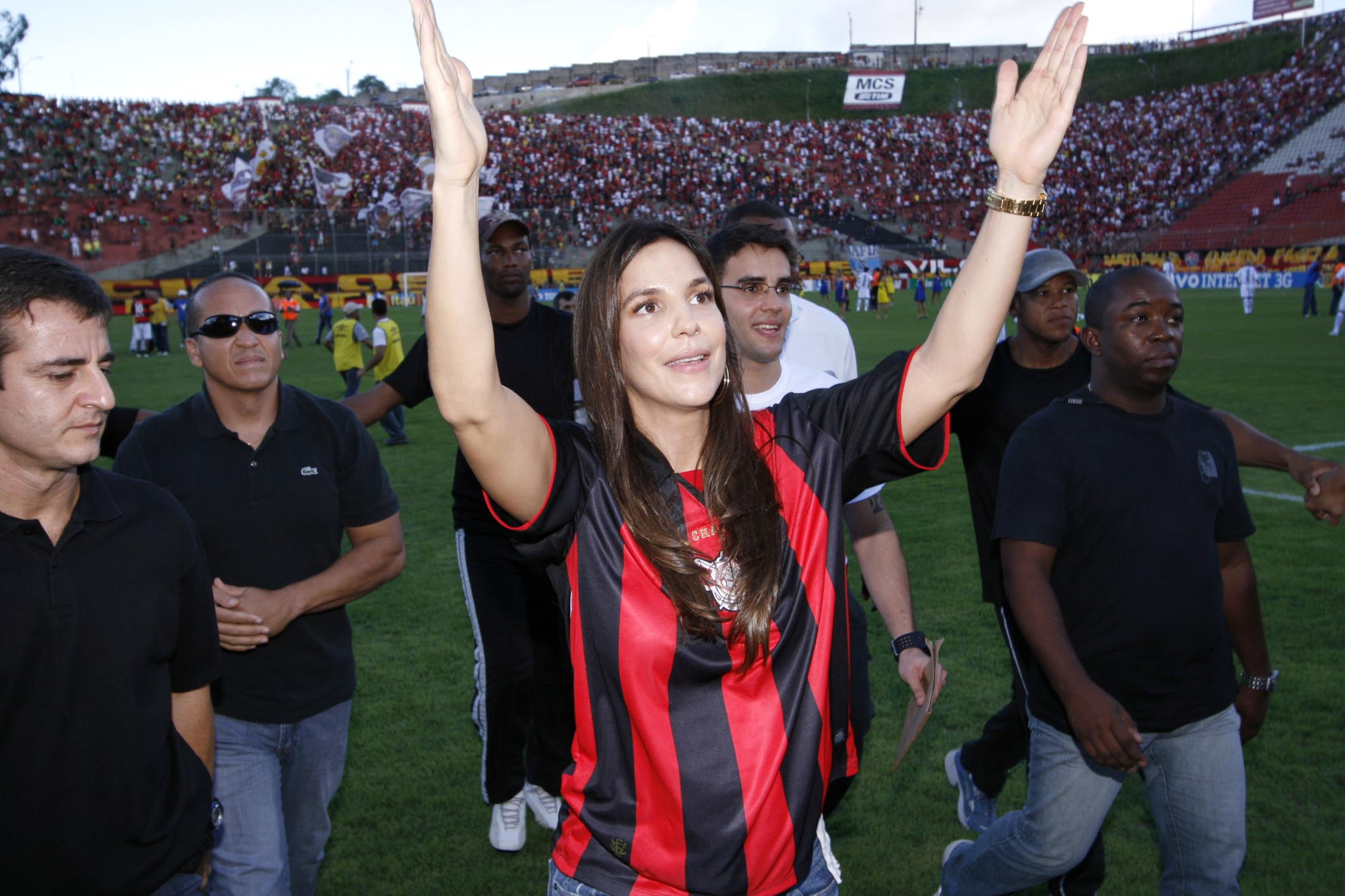 Ivete Sangalo na partida entre VitóriaxCeará, pela última rodada da Série B 2012, no estádio do Barradão